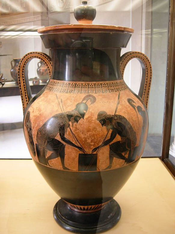 Vatican Museum Antiquities